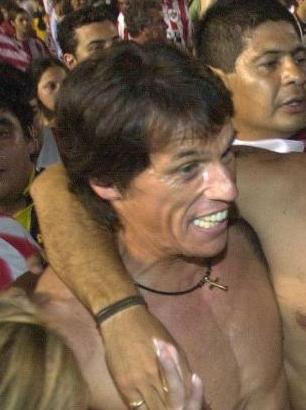 José Luis Calderón, jugador de Estudiantes de La Plata.